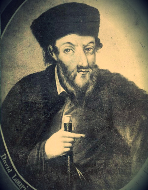 דוד לוריא. תצלום רפרודוקציה מציור דיוקנו של הרב דוד לוריא: הדפס בגוני חום, מודבק על גבי כרטיס בתבנית Cabinet card, הופק בעיר מוהילב ע"נ דניפר, כנראה בסוף המאה התשע עשרה. בגב התצלום, חותמת בית הספר לאמנות "בצלאל".